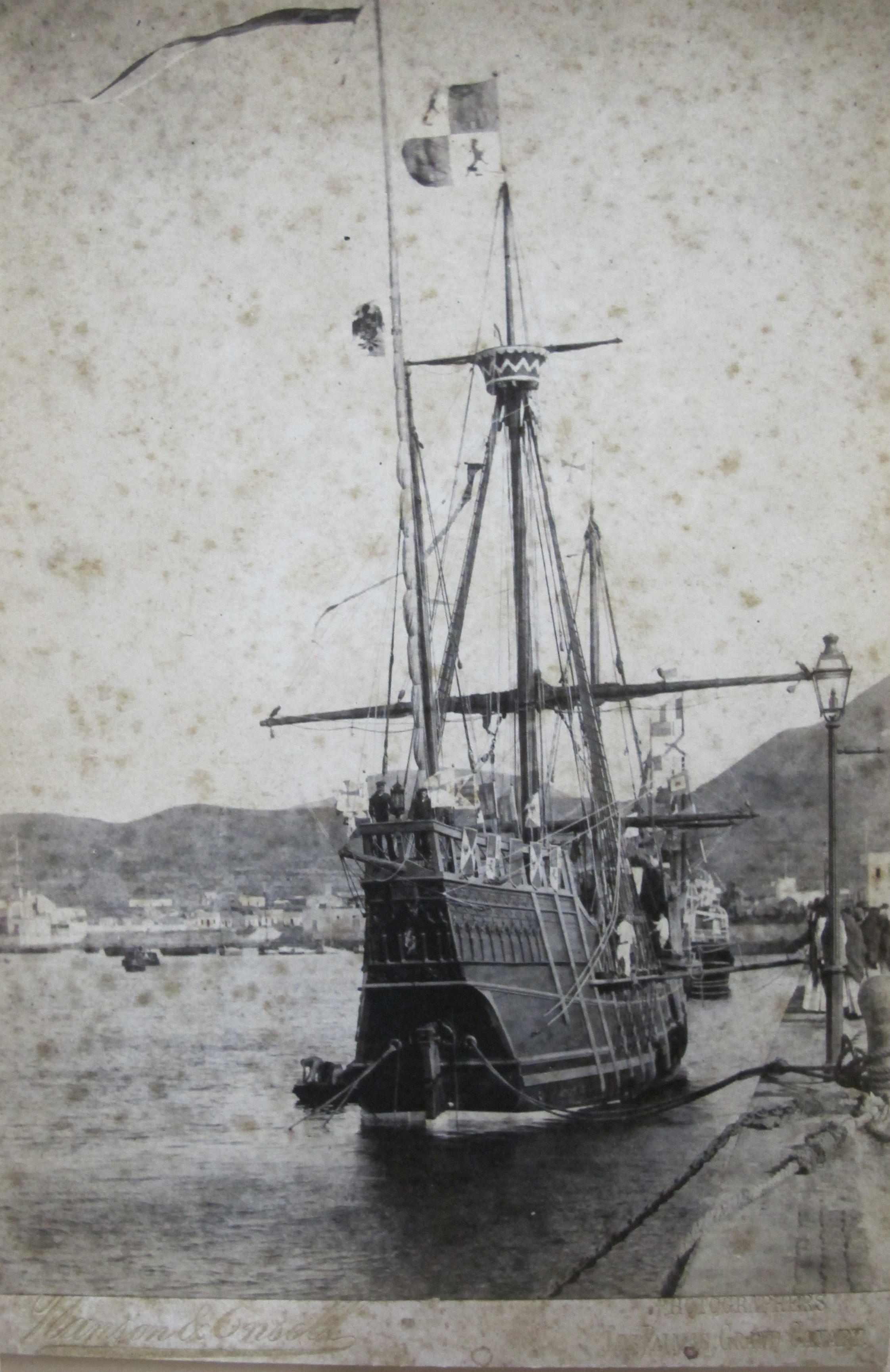 Nau (carrack) Santa María en su viaje conmemorativo del IV Centenario del descubrimiento de America de de Nanson and Ensell 1893.Exposición fotografías antiguas "Gran Canaria desconocida". Las colecciones fotográficas de la Casa de Colón.Las Palmas de Gran Canaria